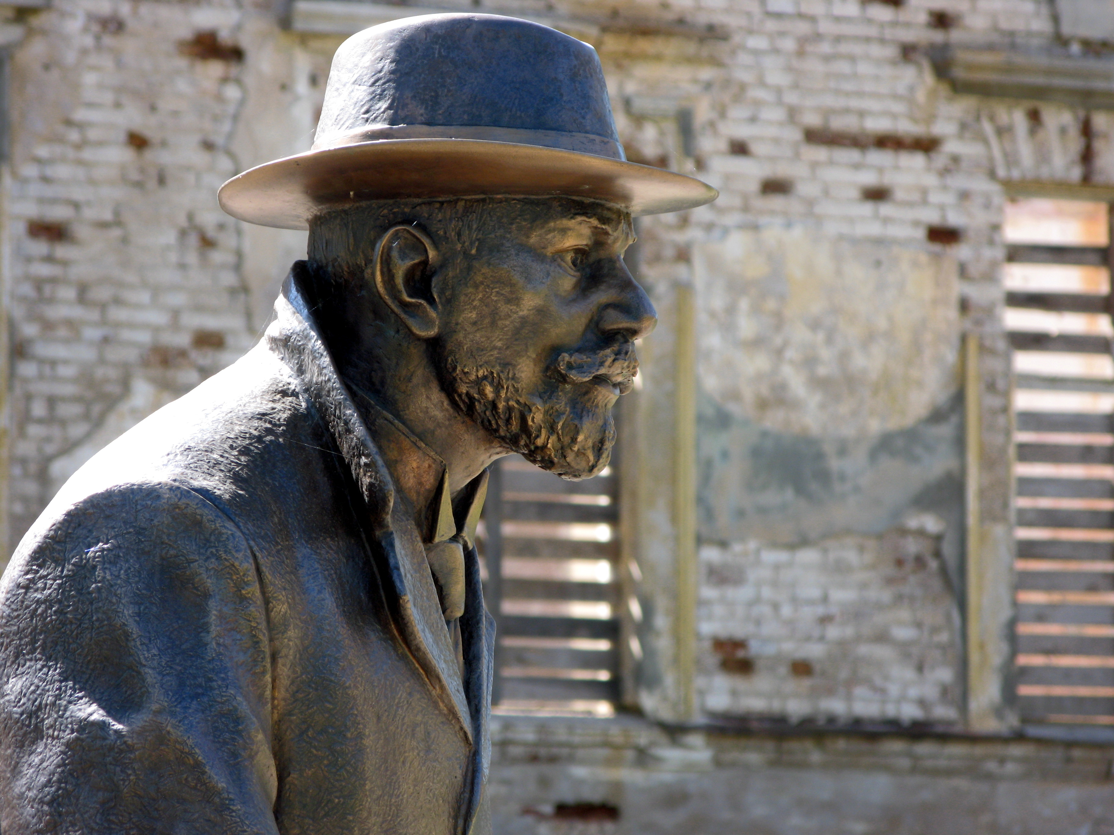 Mālpils, Vilhelms Bokslafs